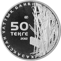 Монета Казахстана Богомол